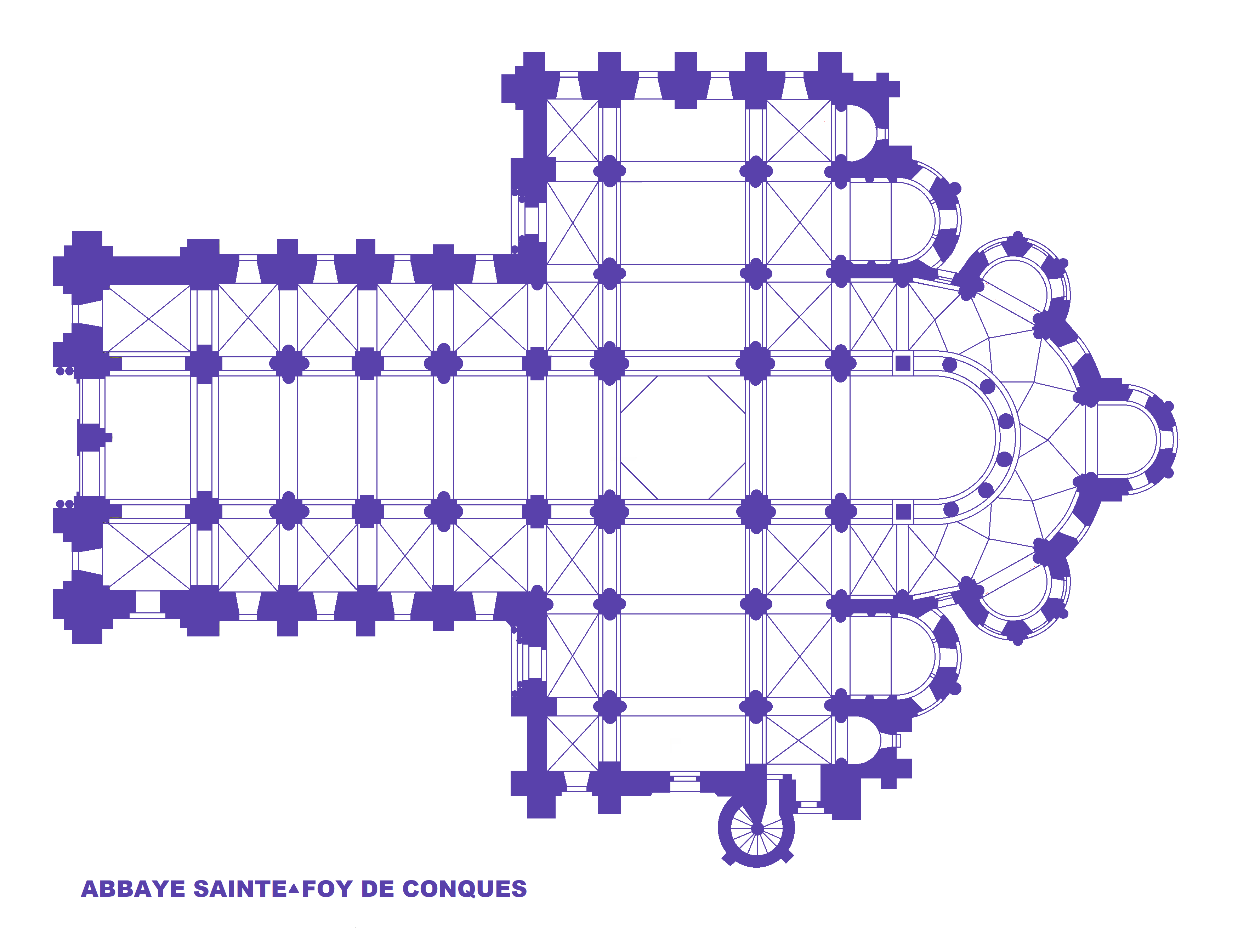 Abbaye Saint-Foy de Conques, plan